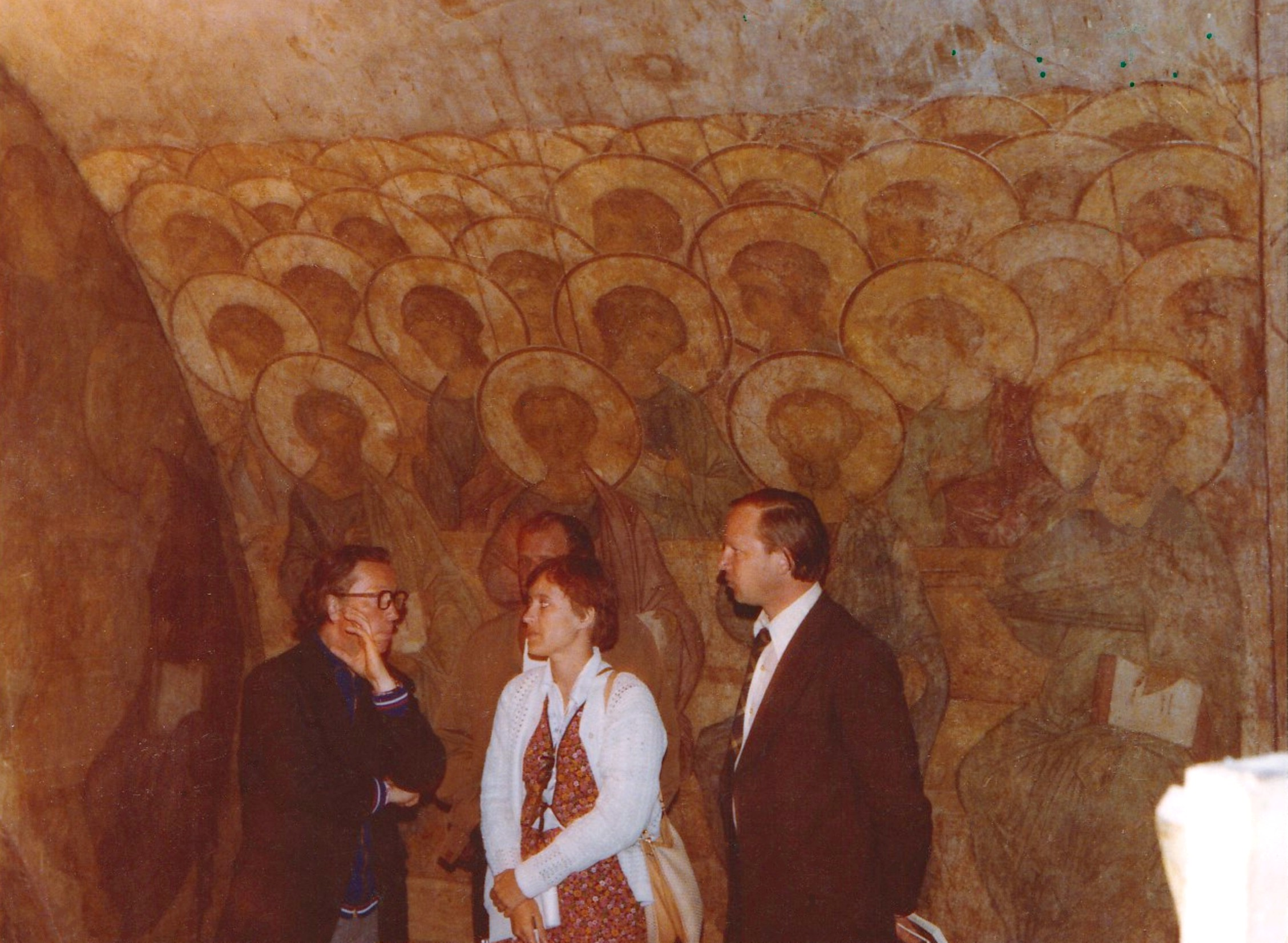 Vasemmalla Nekrasov, keskellä Yleisradion tulkki Irina Markov, oikealla Gosteleradion yhteystoimittaja